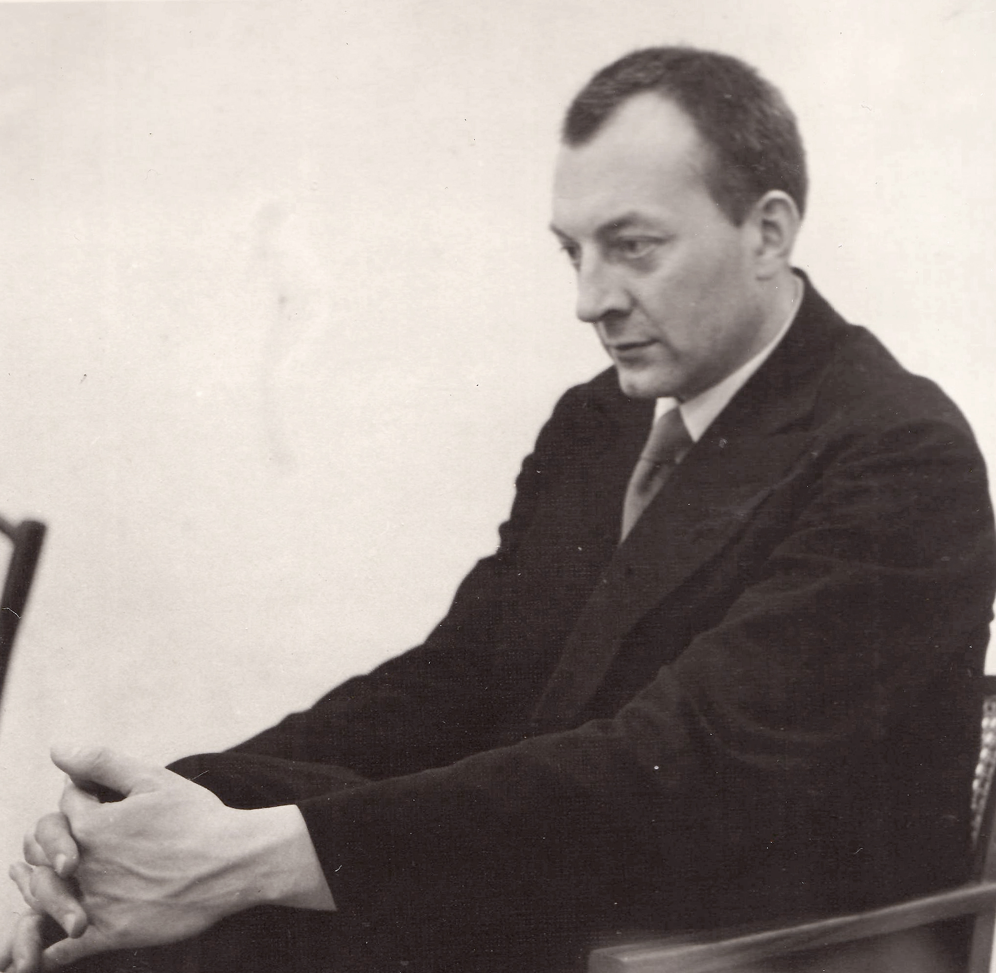 Offenbacher Arzt, Homöopath und Schriftsteller.